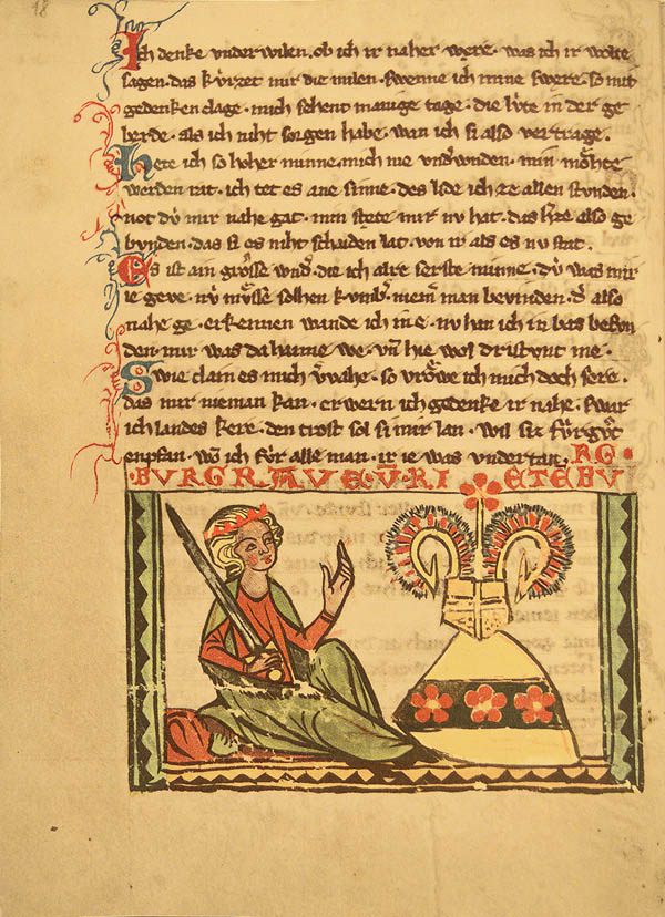 Weingartner Liederhandschrift (also known as Stuttgarter Liederhandschrift), page 18